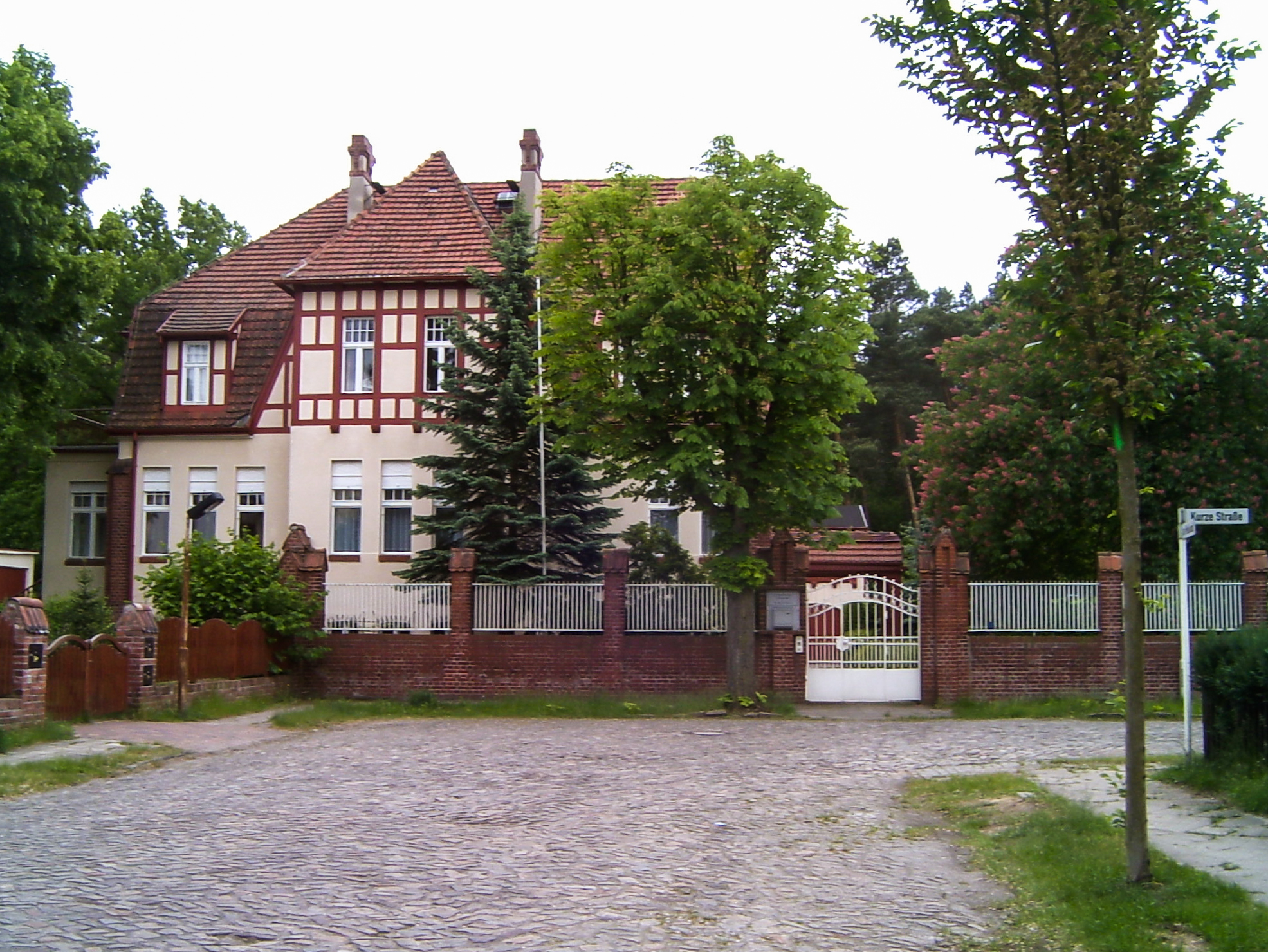 Alte Parteischule der KPD